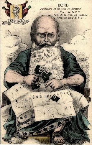 Caricature d'Ernest Bord